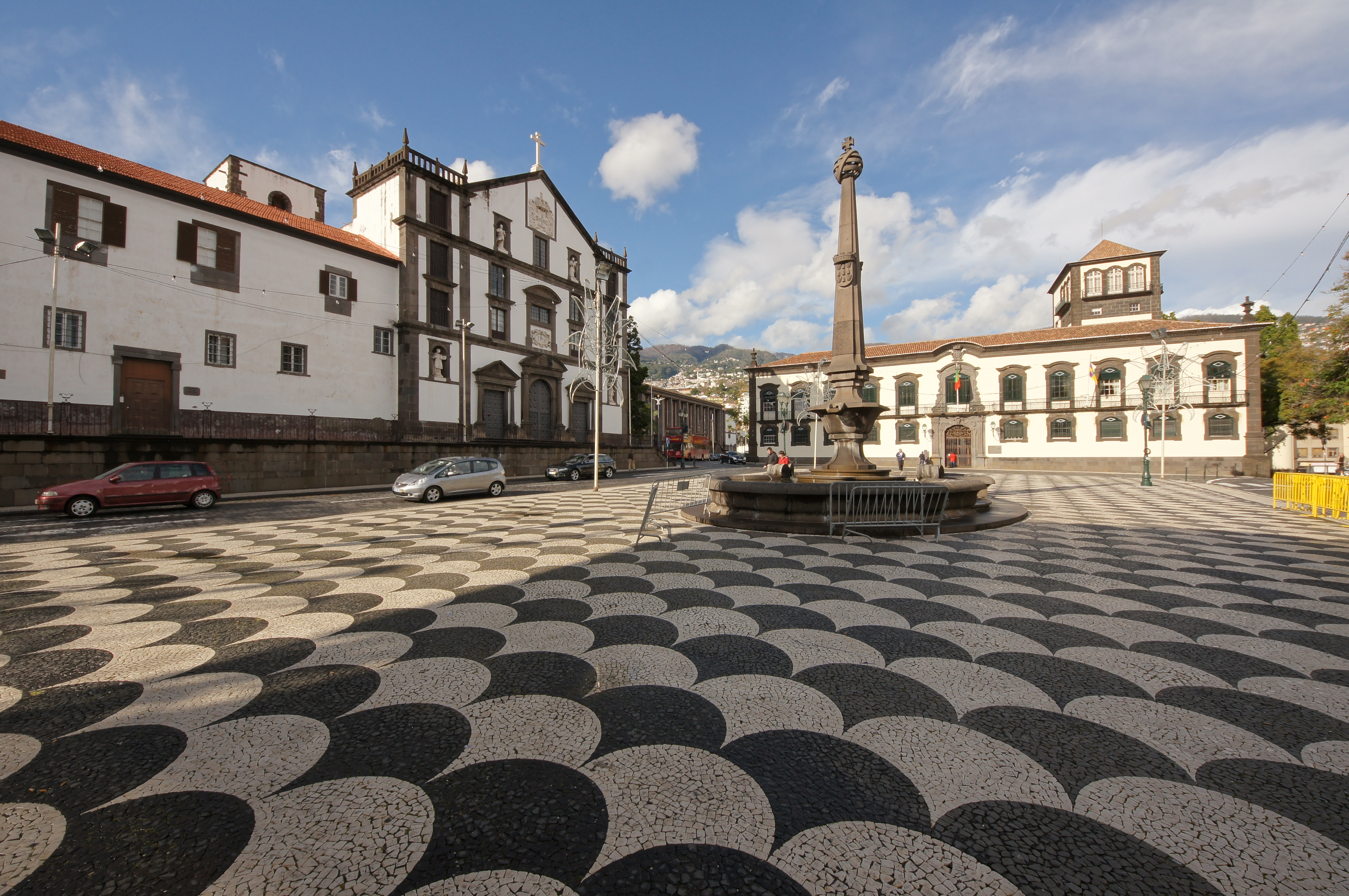 Praça do Município, Funchal